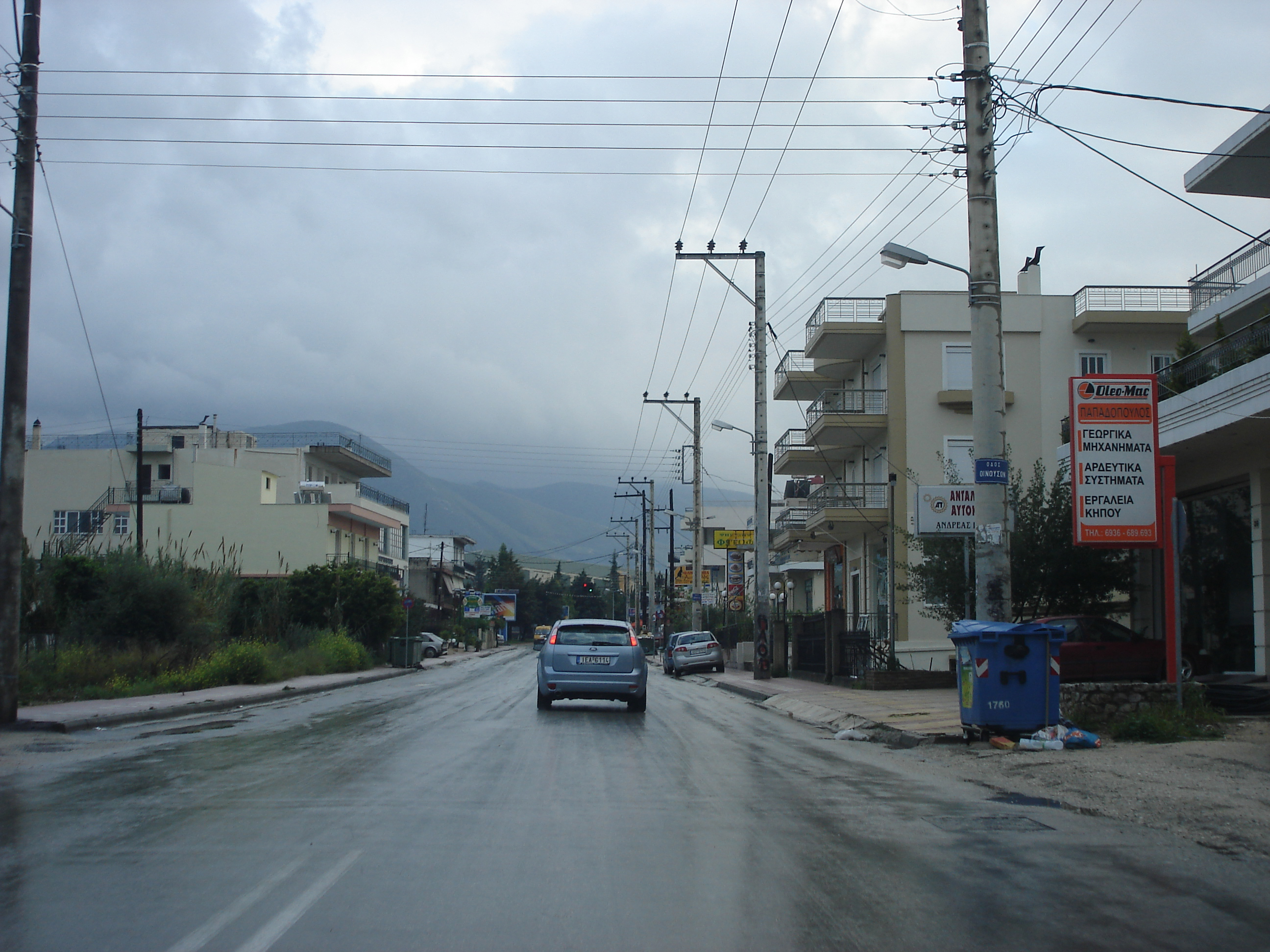 Laggoyra Patra Greece